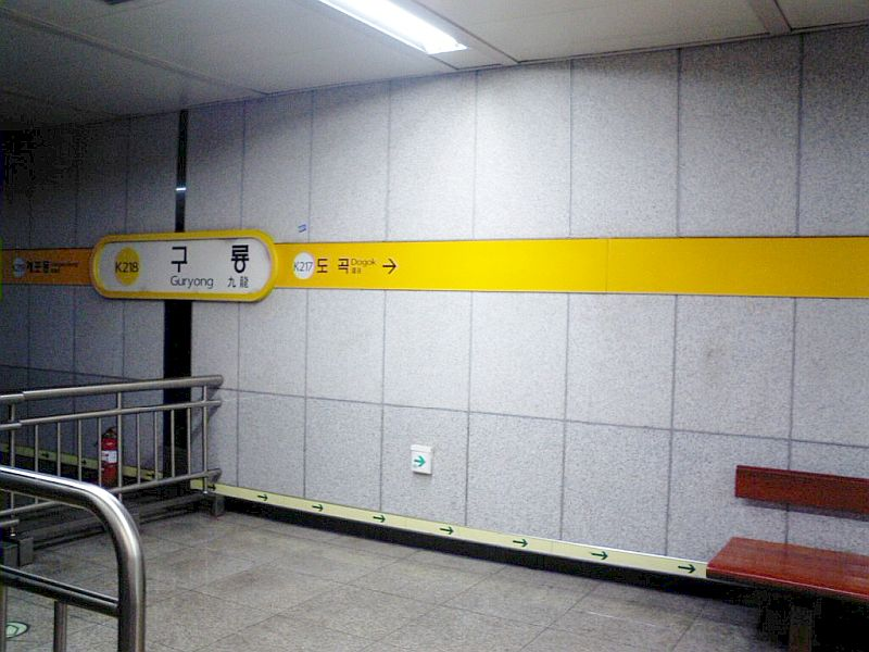 수도권전철 분당선 구룡역